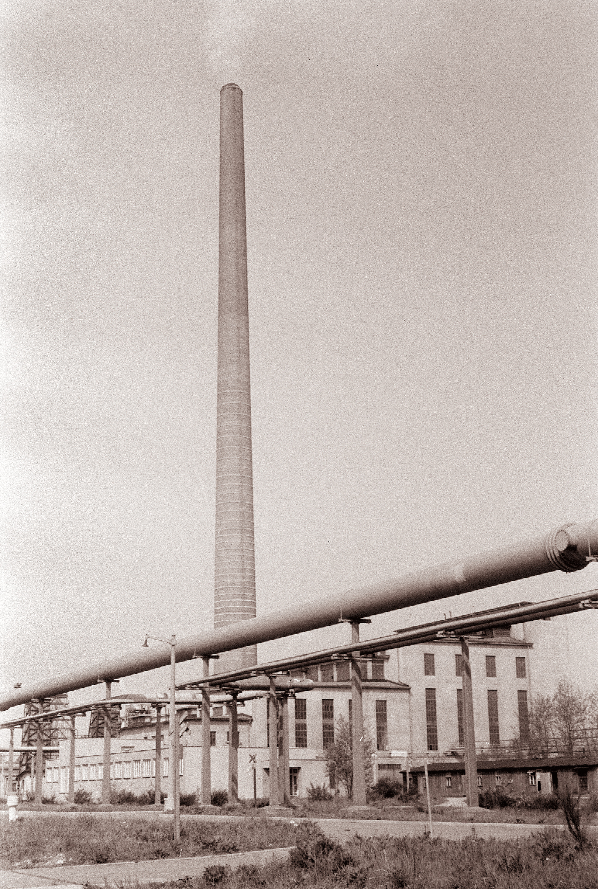 Tovarna glinice in aluminija Kidričevo